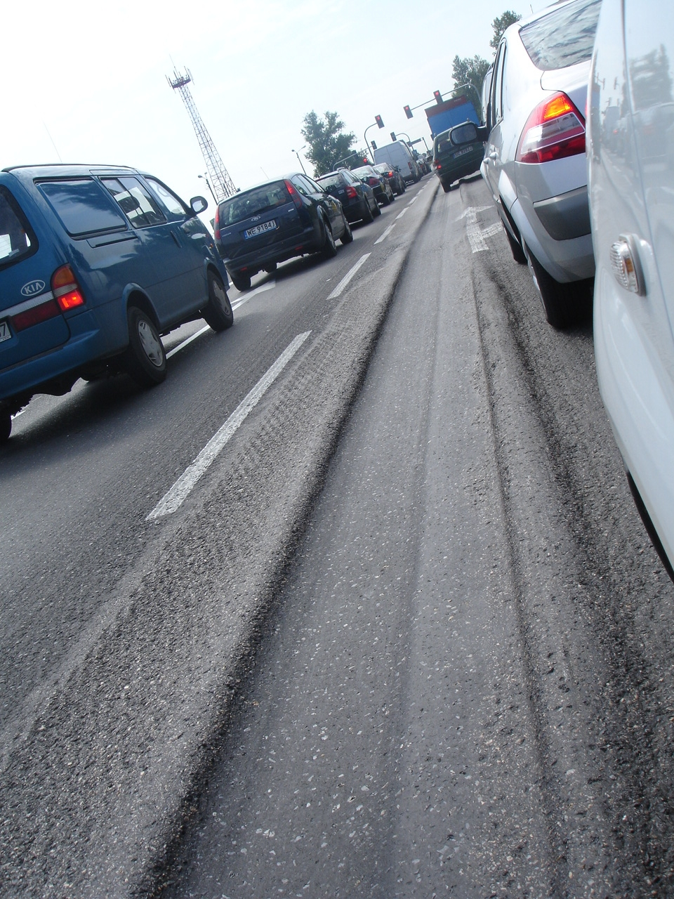 14 cm koleiny na DK1 w Poczesnej